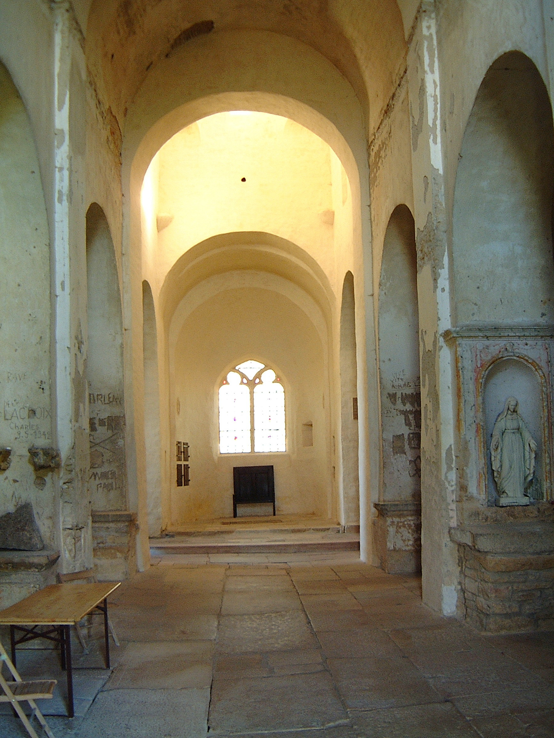 Navo de la Preĝejo Sankta Marteno en Laives